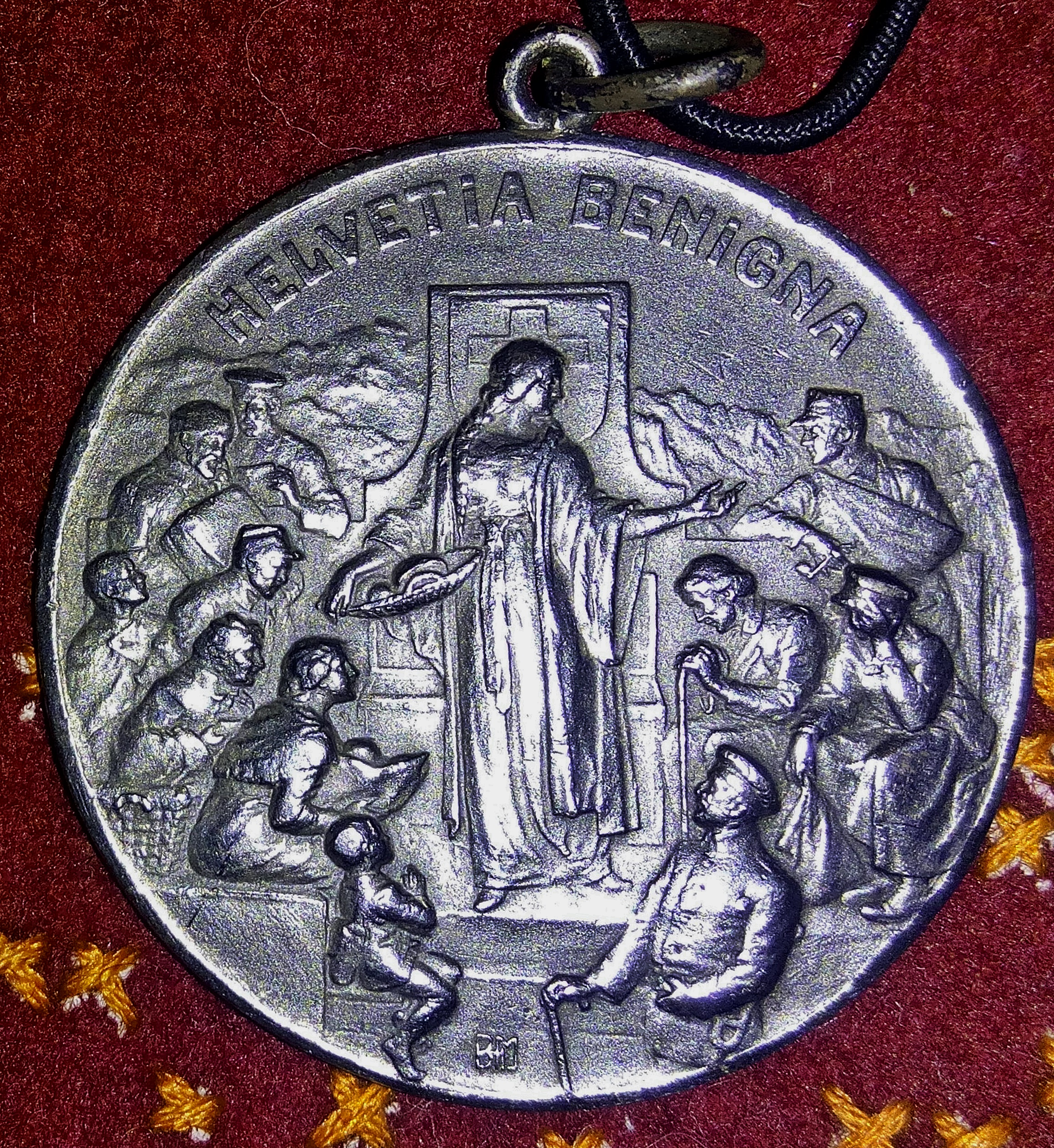 Deutsches Reich, Helvetia-Benigna-Medaille, 1917, Vorderseite